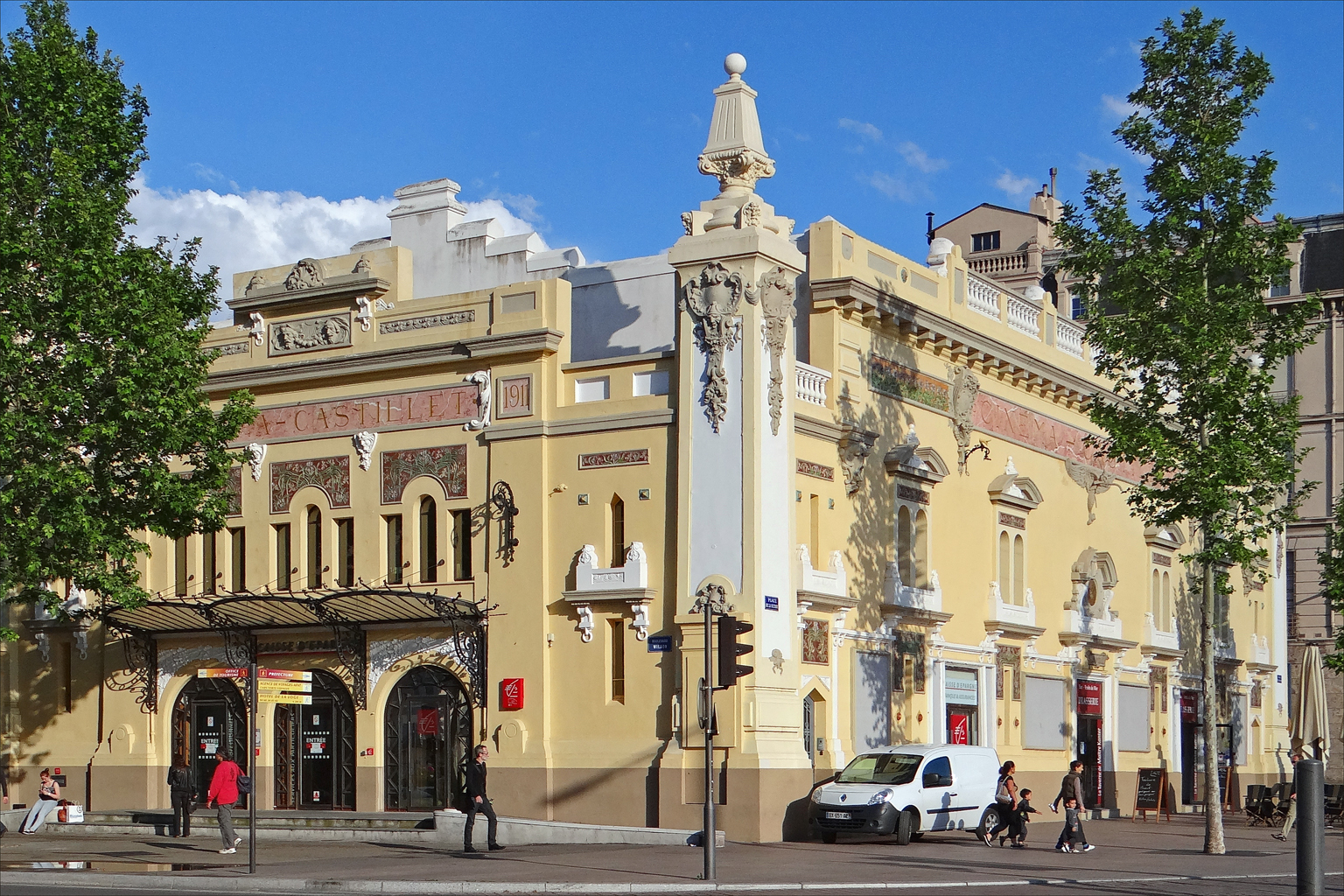 Vue d'ensemble du cinéma "le Castillet" Le Castillet est le plus ancien cinéma de Perpignan. Il a ouvert ses portes en 1911. Le bâtiment a été conçu dans le style "art nouveau" (moderniste) par l'architecte Montes sur commande de Joan Font, un catalan qui avait ouvert une salle de cinéma en 1906 à Barcelone. Les décors sculptés sont d'Auguste Guénot.